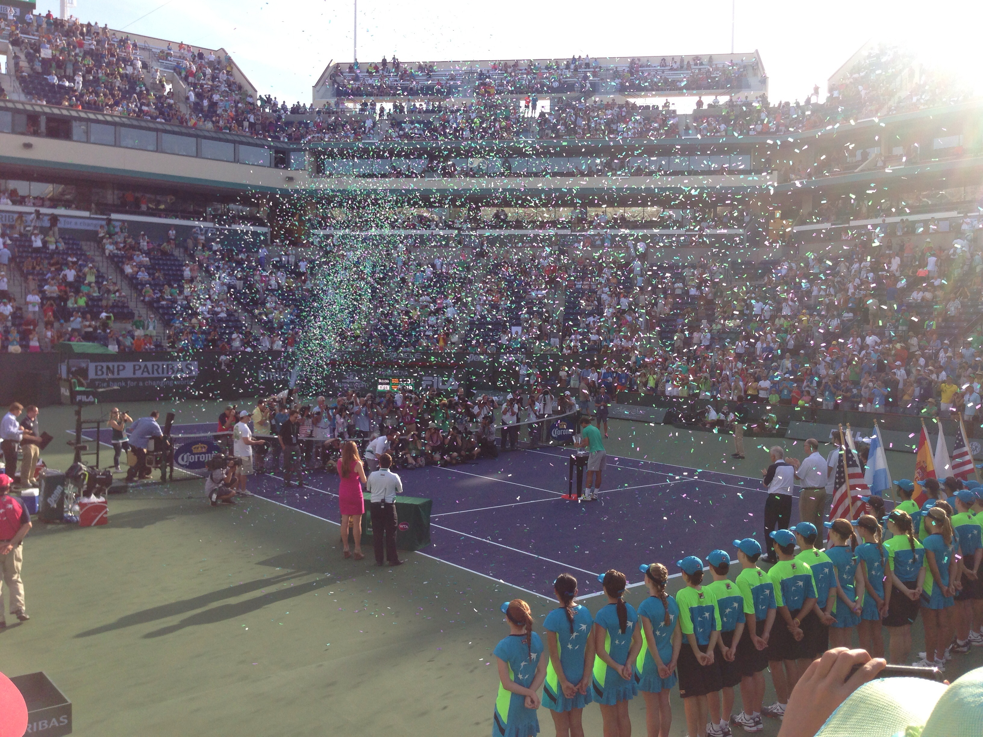 2013 BNP Paribas Open - Rafael Nadal vs Juan Martín del Potro (final)